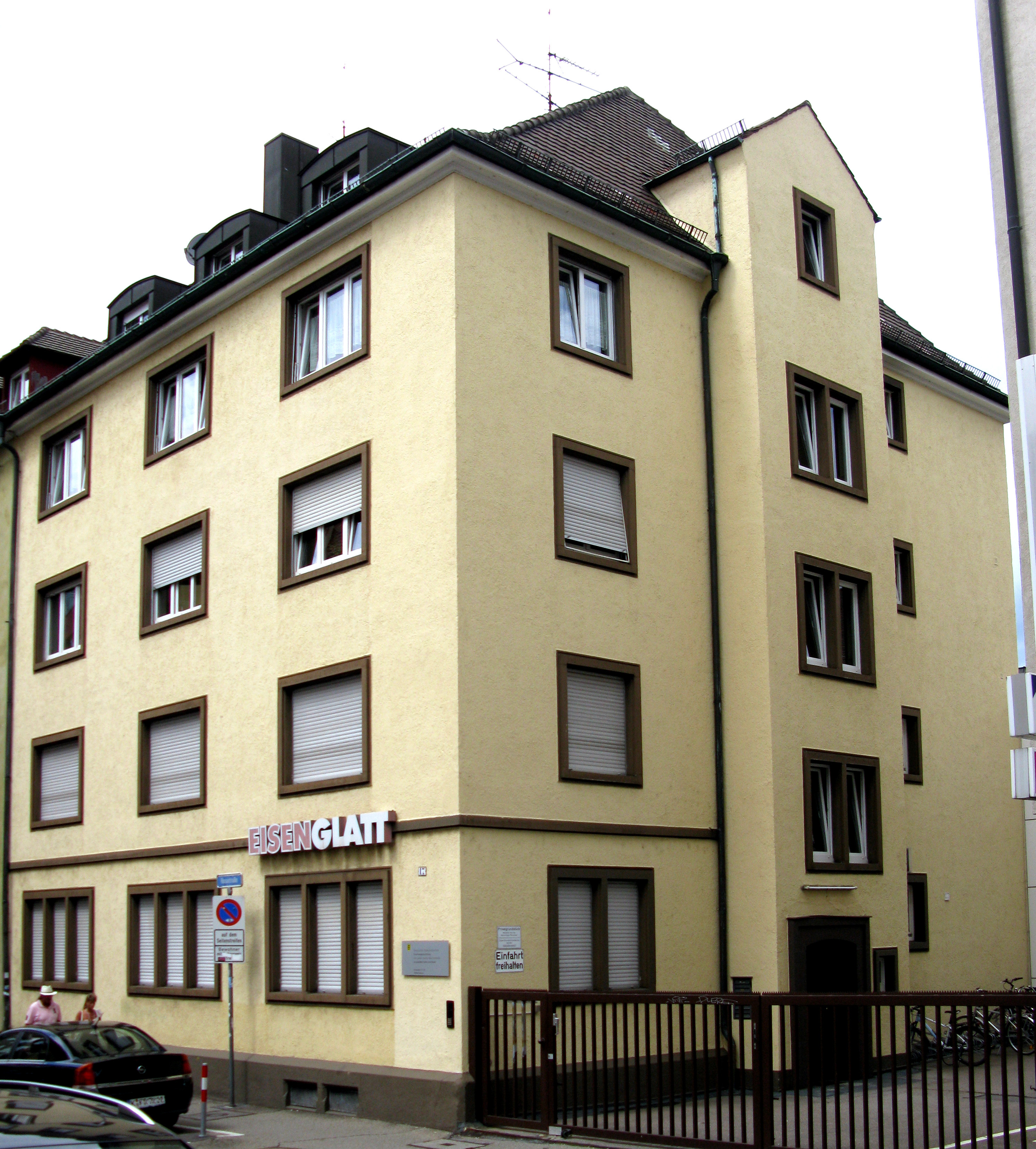 Rosastraße 17 in Freiburg, Sitz des Deutschen Volksliedarchivs